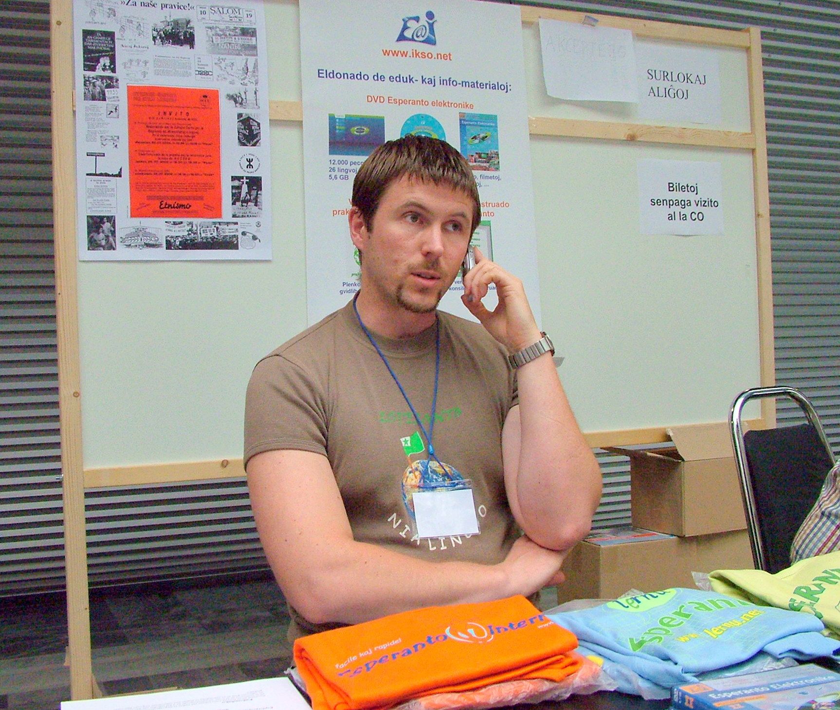 Universala Kongreso de Esperanto, Roterdamo 2008. Peter Baláž de E@I.